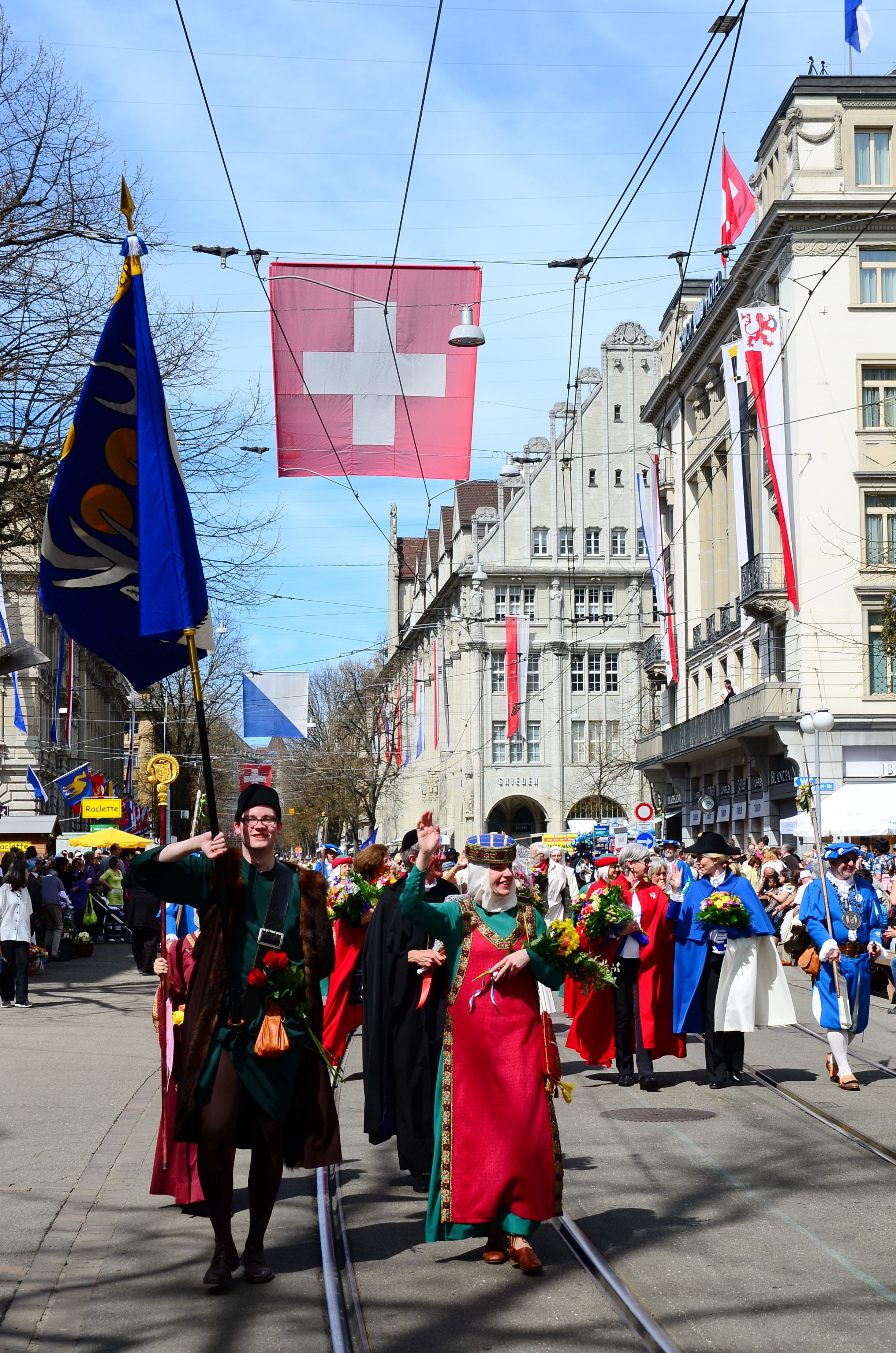 Ladies of the honorable Gesellschaft zu Fraumünster (Fraumünster society respectively guild), being (unwanted) 'guests' at the parade of the Zünfte (guilds), on Sechseläuten-Montag, April 15, 2013, in Zürich (Switzerland)